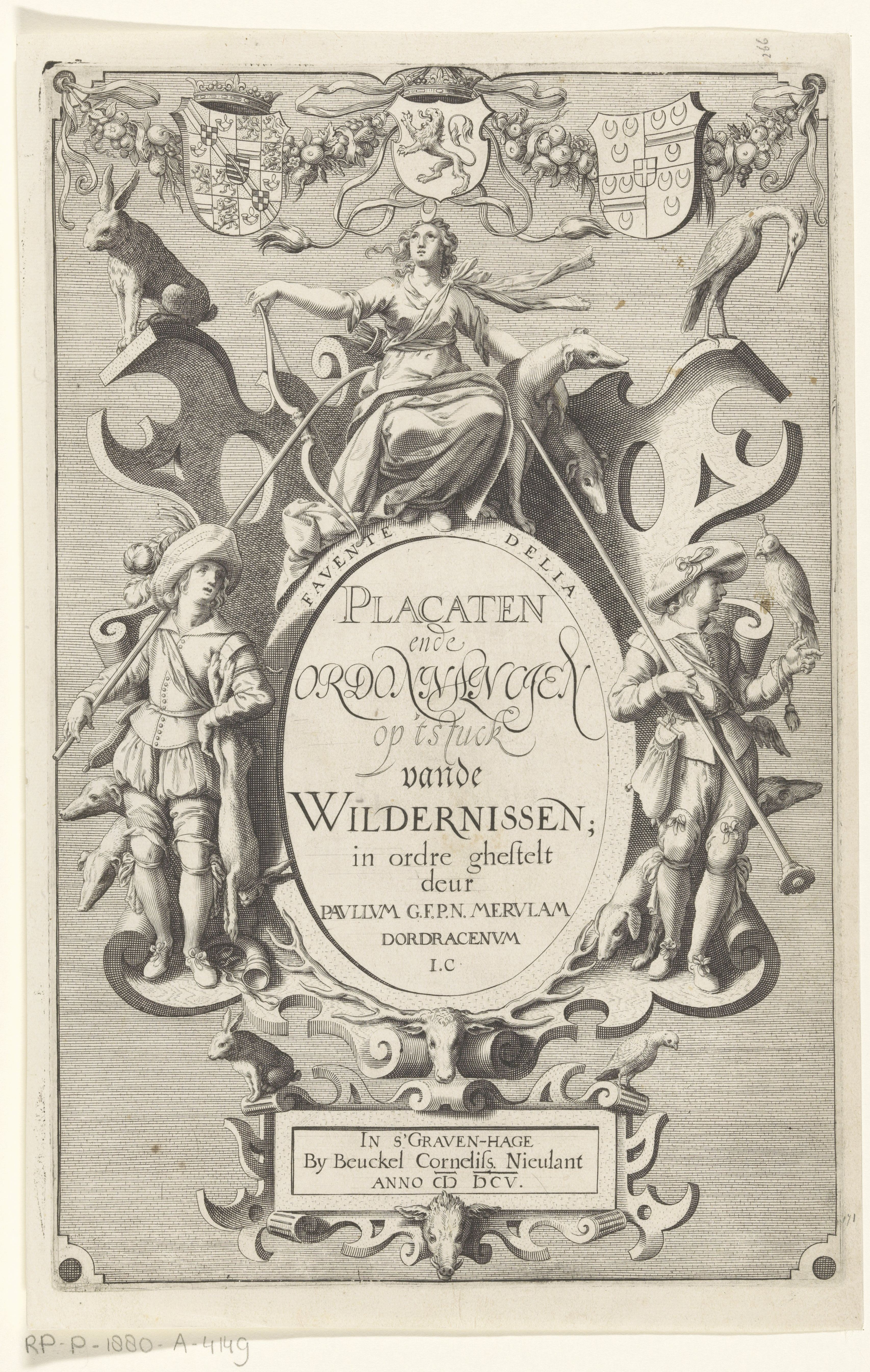 IdentificatieTitel(s): Cartouche met Diana en jagerTitelpagina voor: Paulus Merula, Placaten ende Ordonnancien op 't stuck van de Wildernissen, 1605Objecttype: prent titelpagina Objectnummer: RP-P-1880-A-4149Opschriften / Merken: verzamelaarsmerk, verso, gestempeld: Lugt 2228Omschrijving: Op een cartouche met titel zit Diana met jachthonden en boog als godin van de jacht. Aan weerszijden staan jagers met honden en stokken. Aan de bovenzijde hangt een fruitguirlande met drie wapenschilden.VervaardigingVervaardiger: prentmaker: anoniemuitgever: Beukel Cornelisz. Nieulandt (vermeld op object)Plaats vervaardiging: Den HaagDatering: 1605Materiaal: papier Techniek: graveren (drukprocedé)Afmetingen: plaatrand: h 269 mm × b 174 mmToelichtingTitelpagina voor: Merula, Paulus. Placaten ende Ordonnancien op 't stuck van de Wildernissen. Den Haag: Nieulandt, Beukel Cornelisz., 1605.OnderwerpWat: ornament ~ cartouche(story of) Diana (Artemis)hunterVerwerving en rechtenVerwerving: aankoop 1880Copyright: Publiek domein